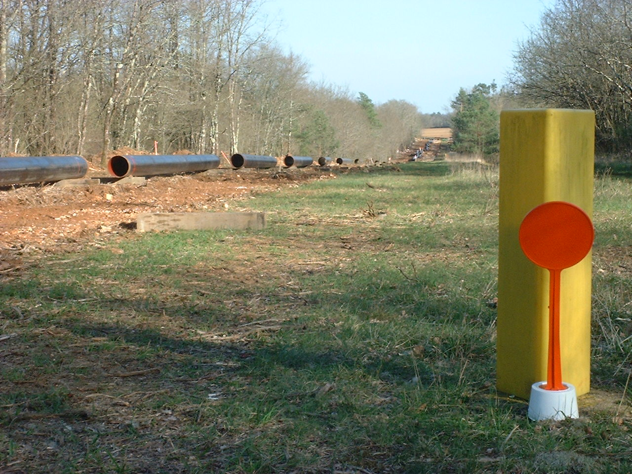 Chantier de gazoduc en cours de doublement à Chazelles (Charente, France), le 5 avril 2008. // Gas pipeline being doubled in Chazelles (France), 2008, april the 5th.